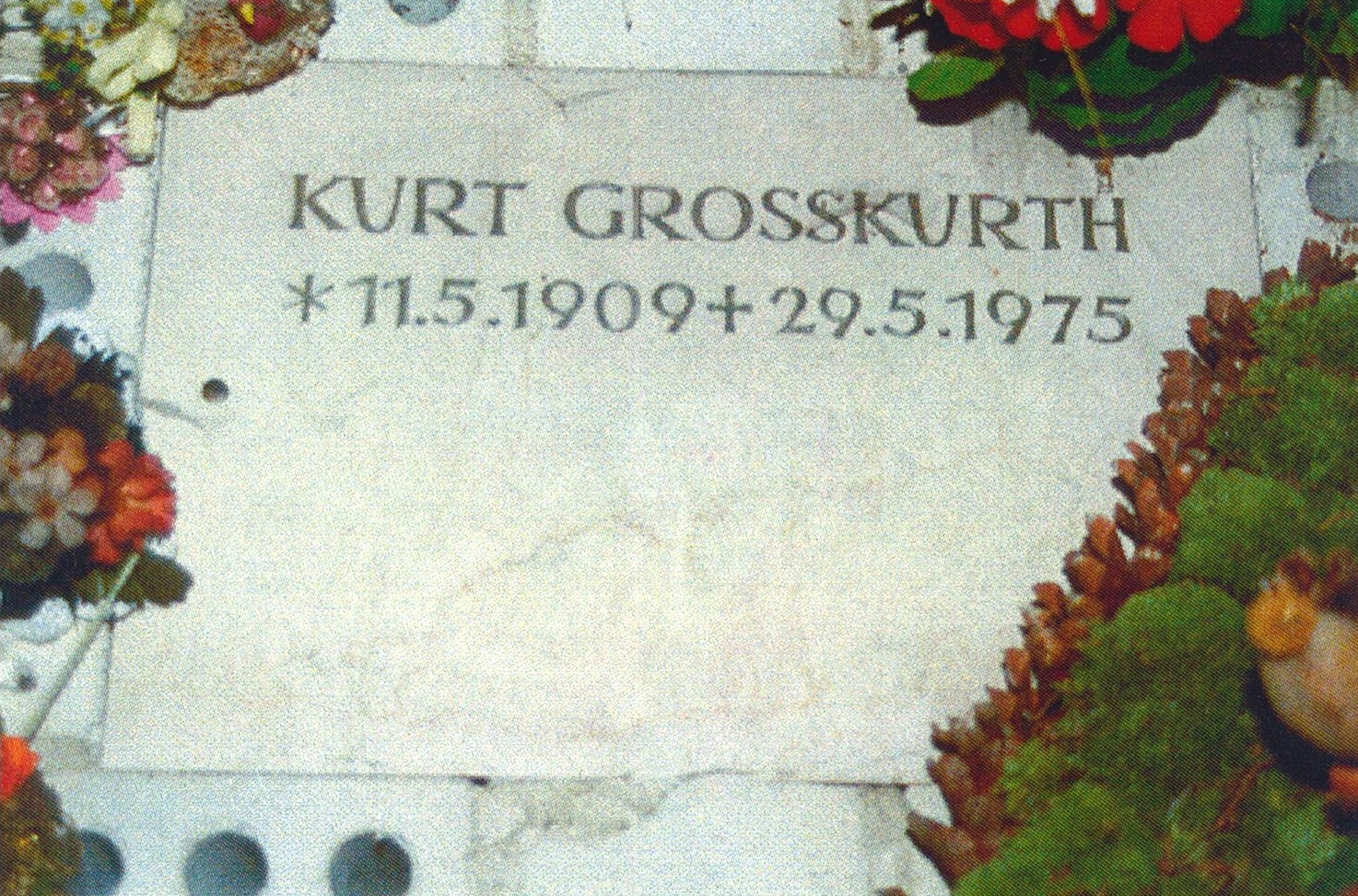 Waldfriedhof Grünwald-Kurt Grosskurth